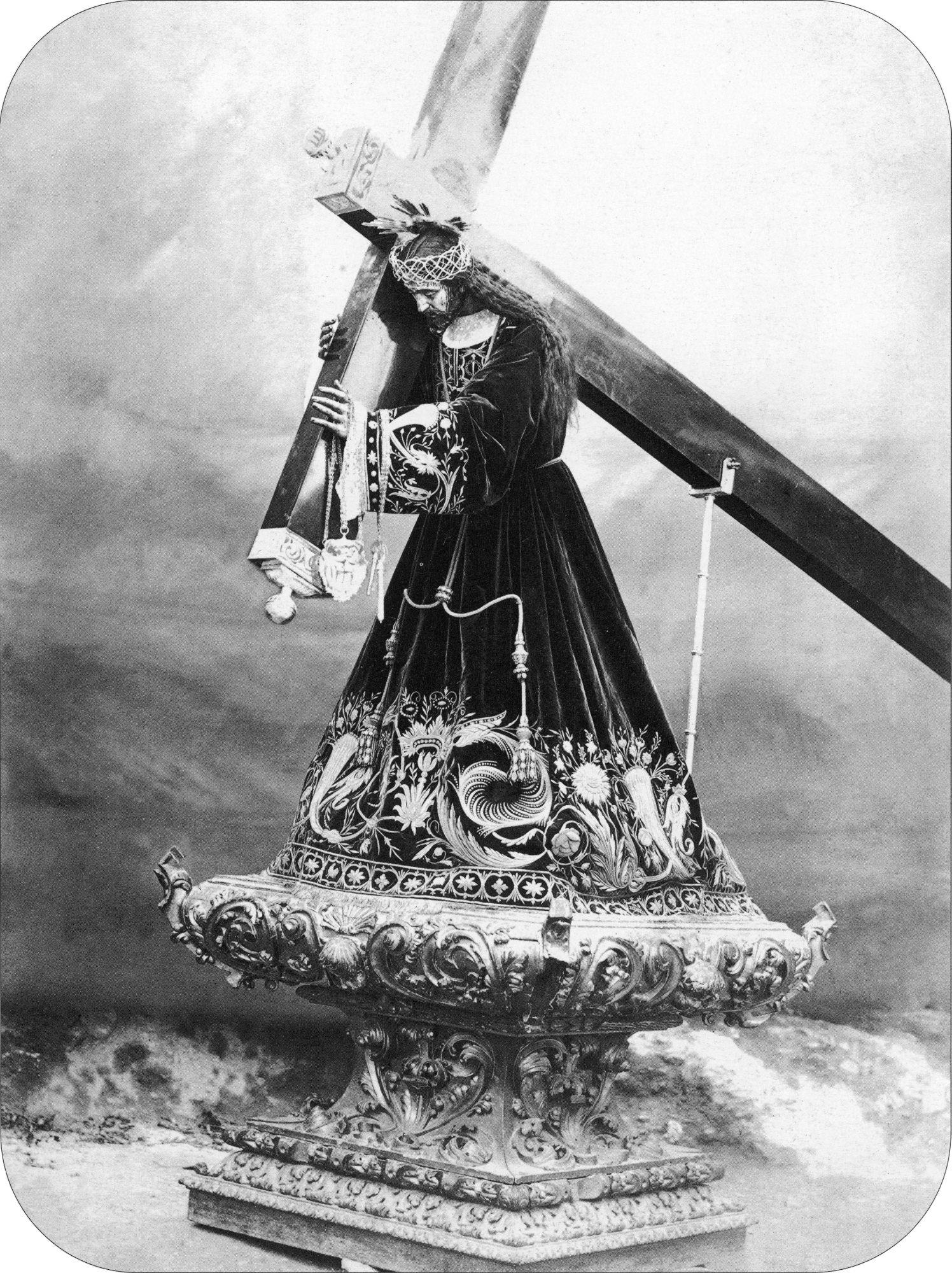 Nuestro Padre Jesús Nazareno, en Jaén.